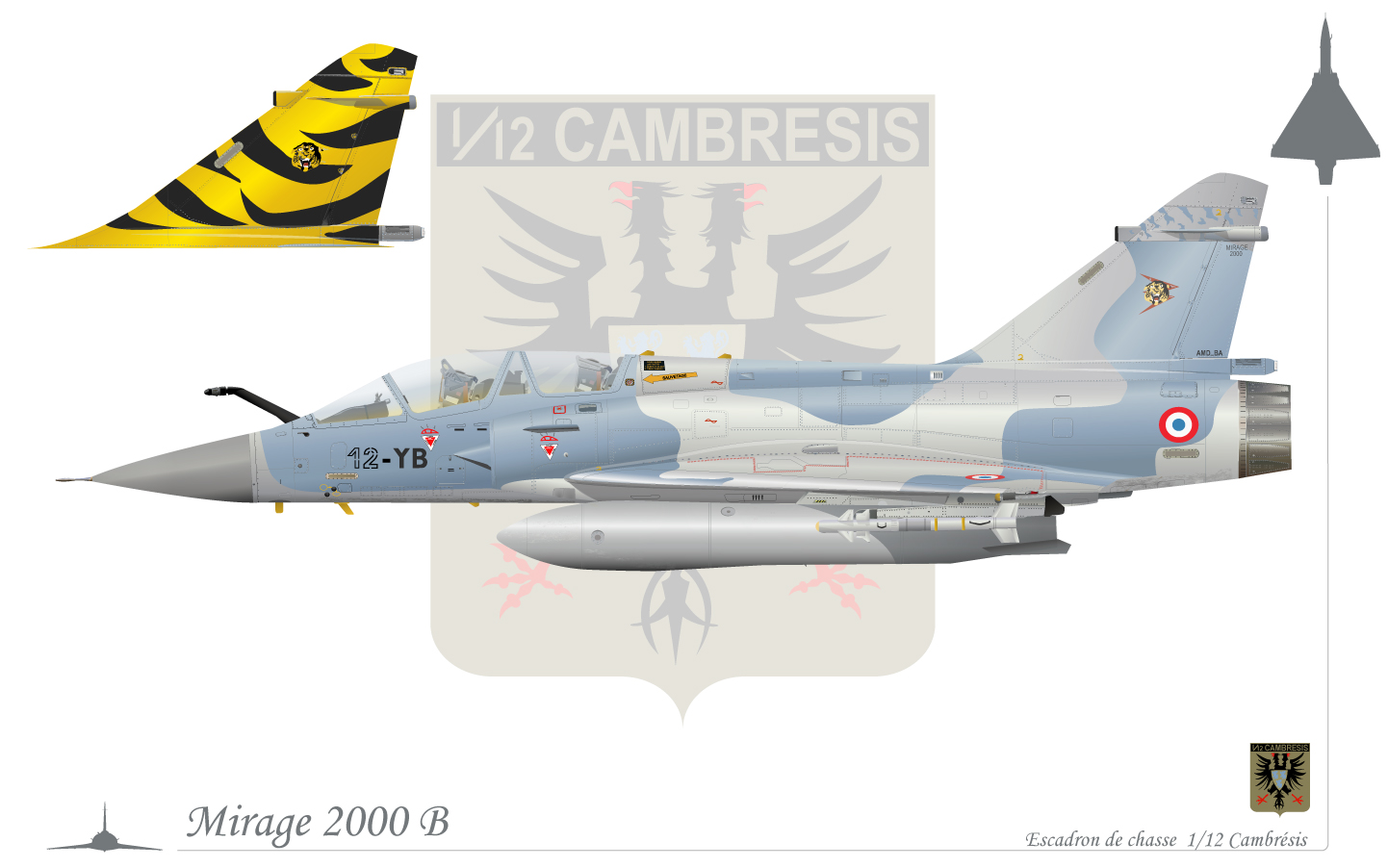 Mirage 2000B escadron cambrésis